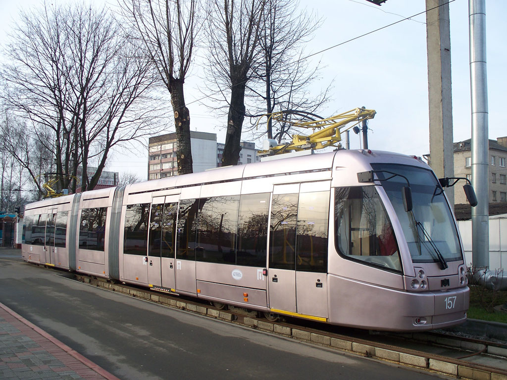 АКСМ-843 на территории трамвайного парка г.Минска